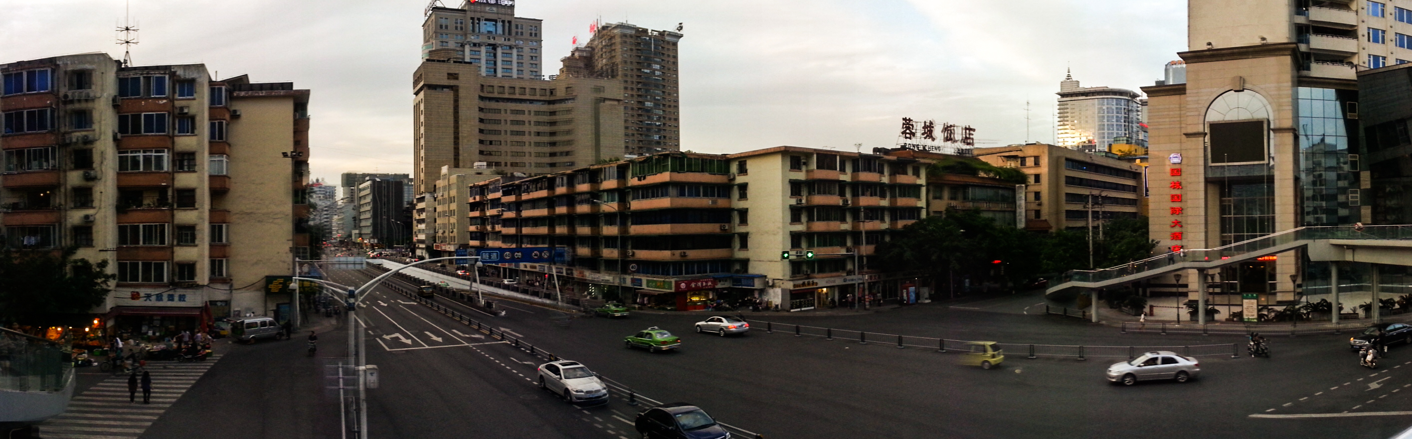 东城根街金盾路口